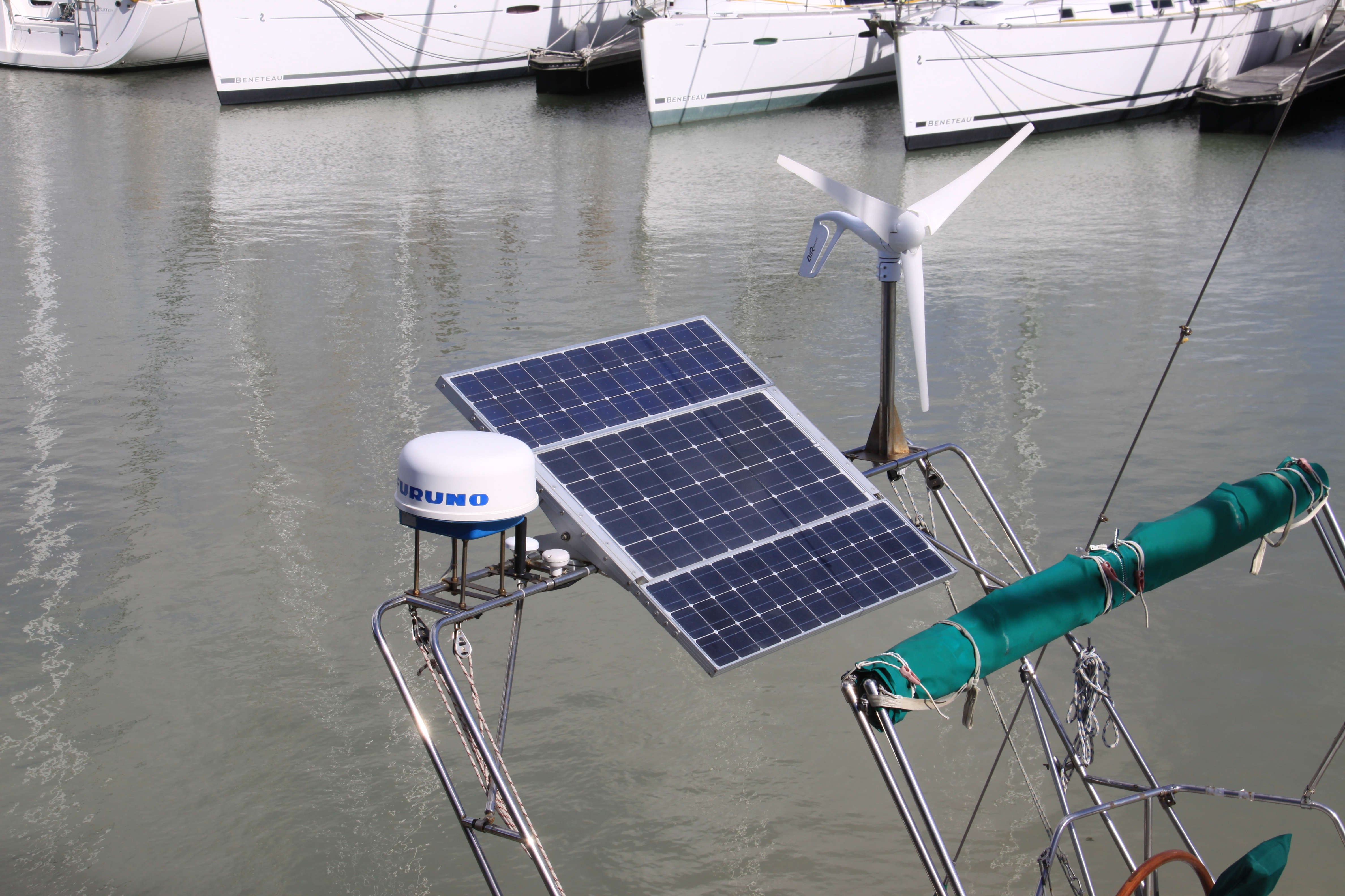 Un panneau solaire installé sur le portique d' un voilier de plaisance. Cette photographie a été prise au Port de Plaisance des Minimes à La Rochelle, France.